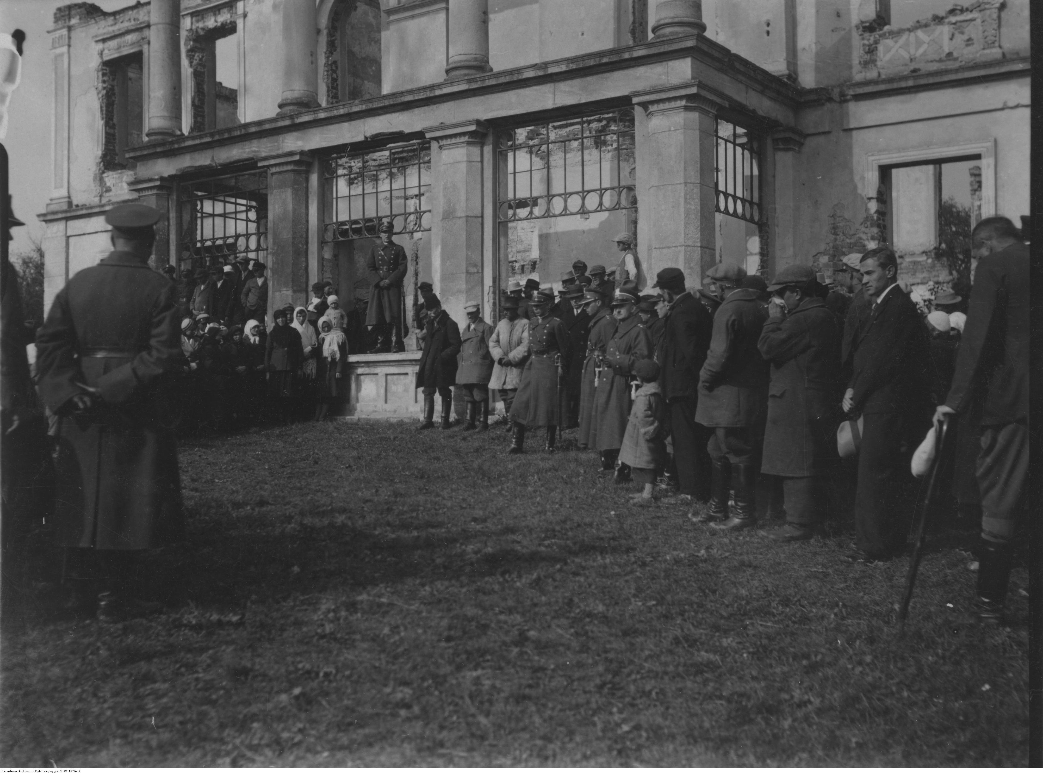 Uroczystości X-lecia istnienia Korpusu Ochrony Pogranicza w kompanii KOP stacjonującej w Turylczu. Przemówienie dowódcy kompanii KOP kpt. Buczka na tle ruin zamku w Turylczu. Koncern Ilustrowany Kurier Codzienny - Archiwum Ilustracji. Sygnatura: 1-W-1794-2